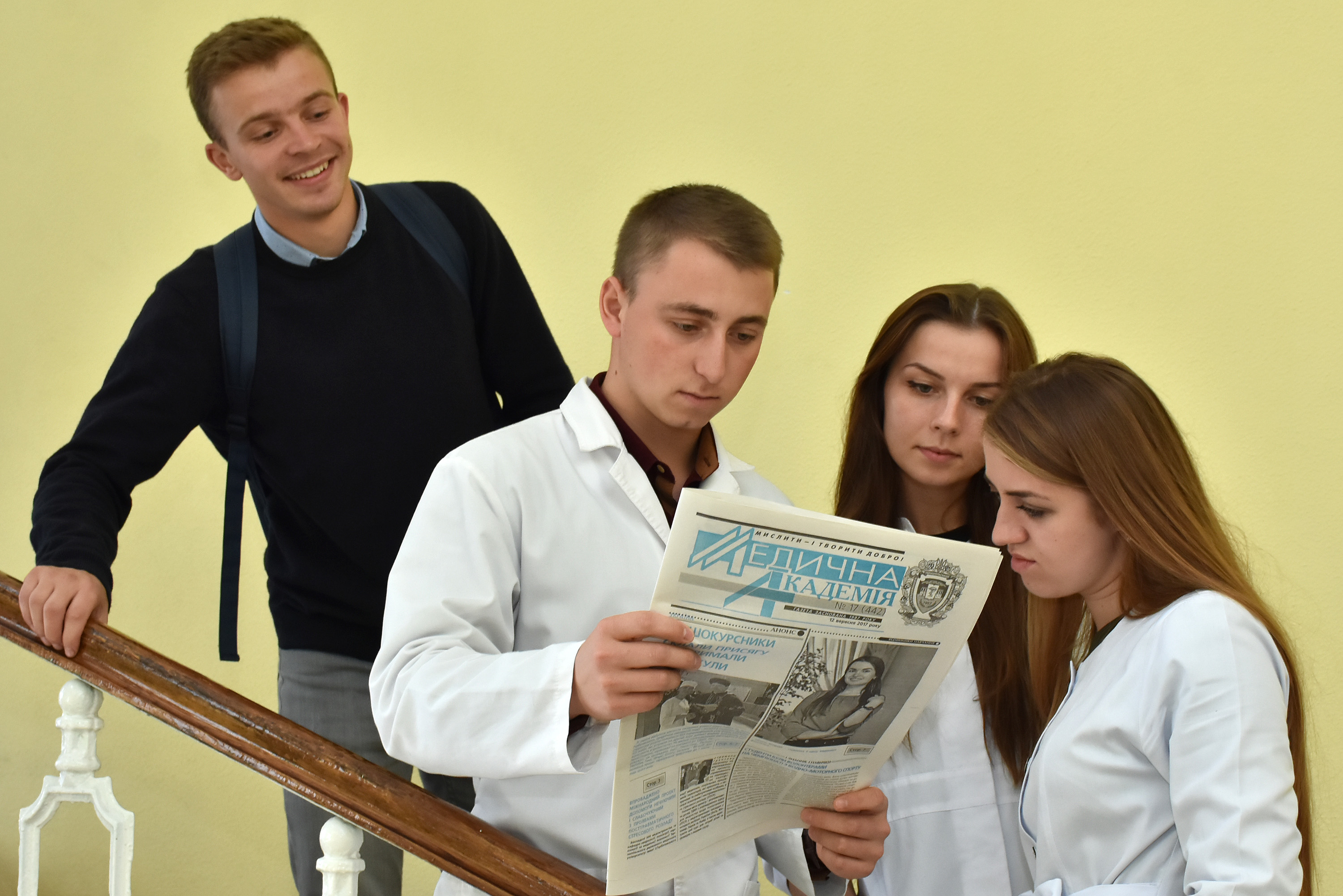 Студенти 6 курсу медичного факультету Тернопільського державного медичного університету імені І. Я. Горбачевського Олександр Заяць, Любомир Данилюк, Софія Дударенко і Надія Вега читають «Медичну академію».